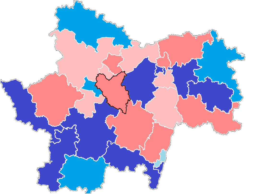 Elections par canton